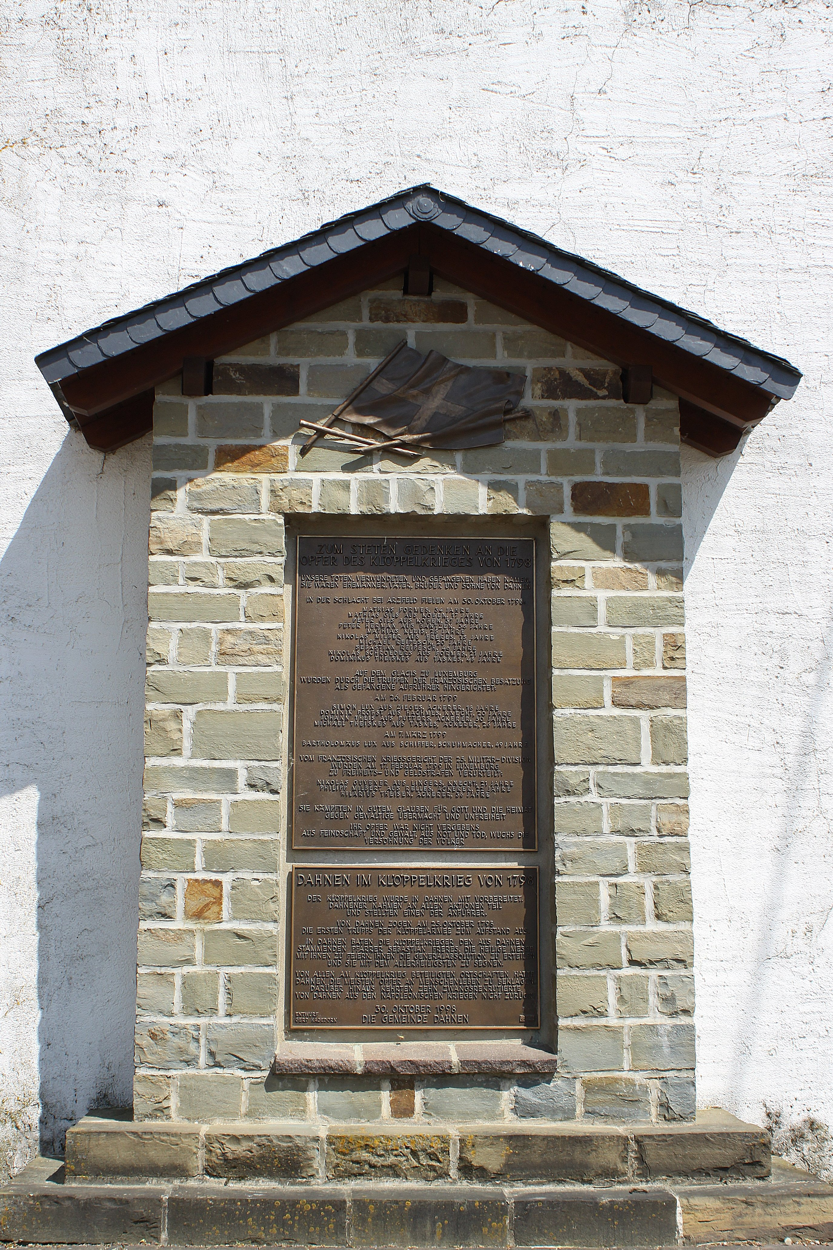 Klöppelkriegdenkmal in Dahnen